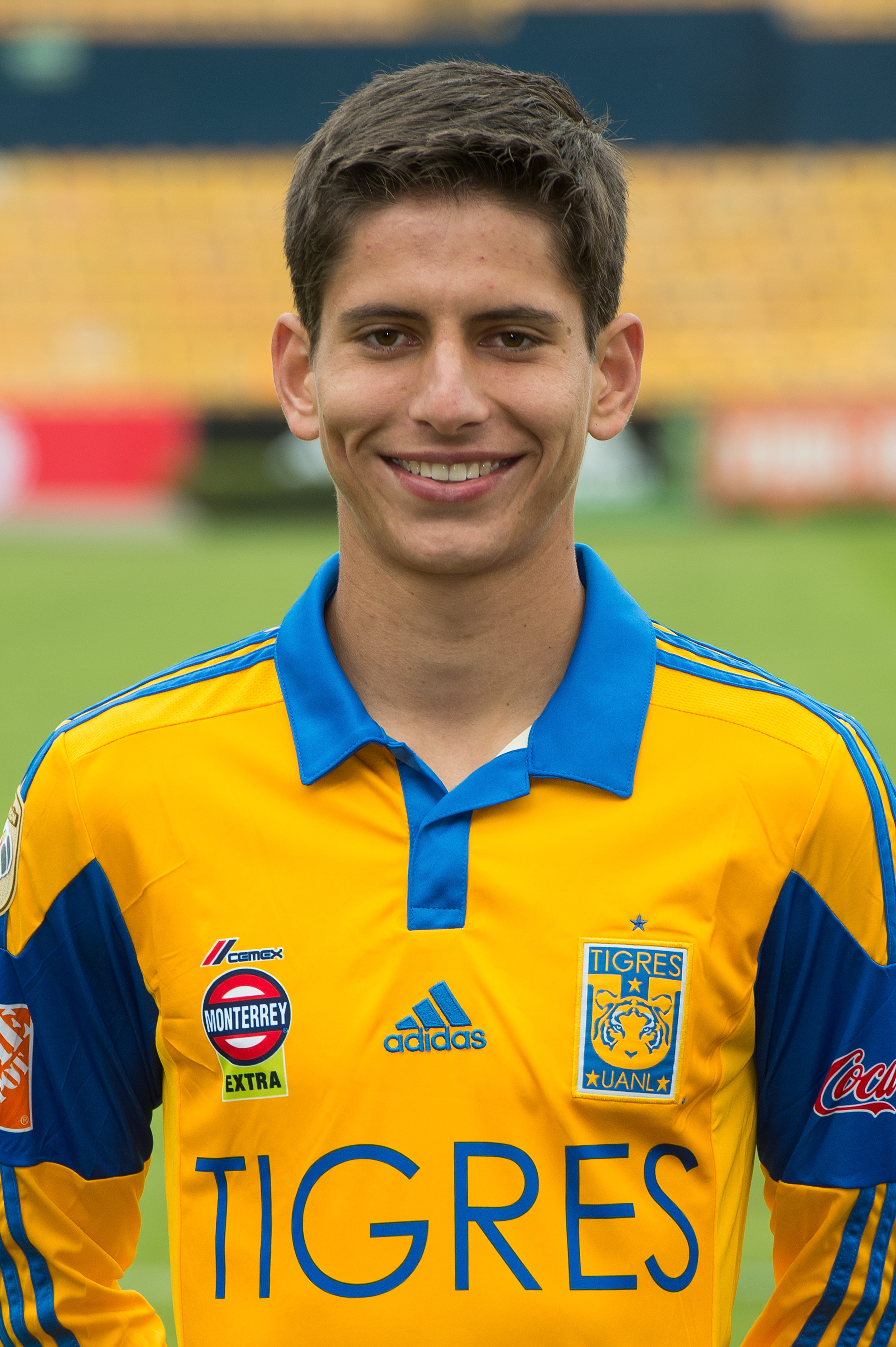 Jurgen Damm Tigres UANL